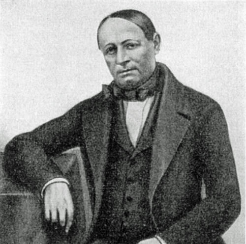 Porträt Leopold Werndls